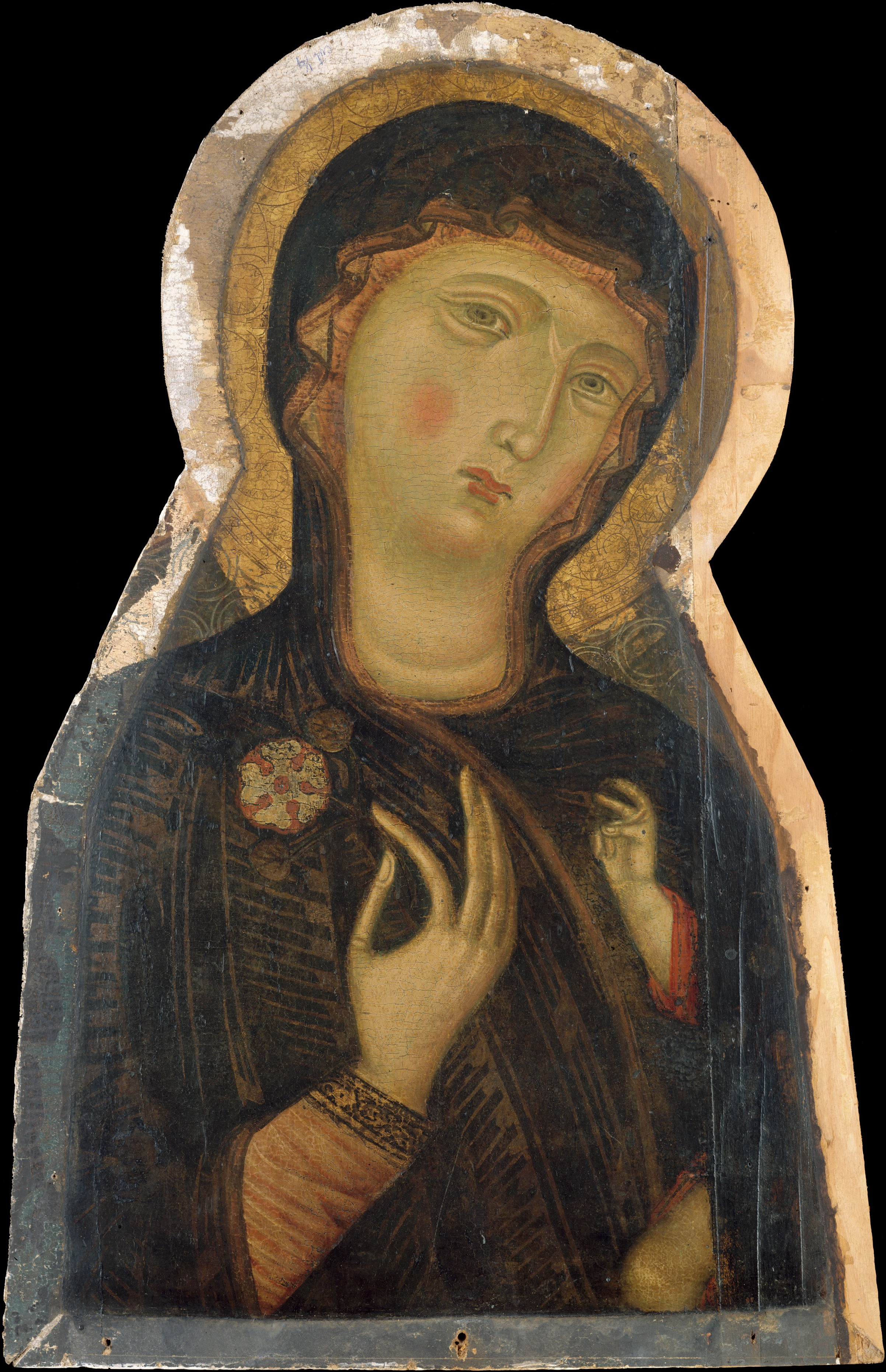 Painting fragment; Paintings